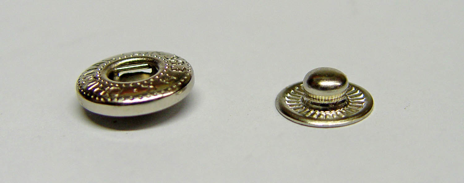 Drockknapp